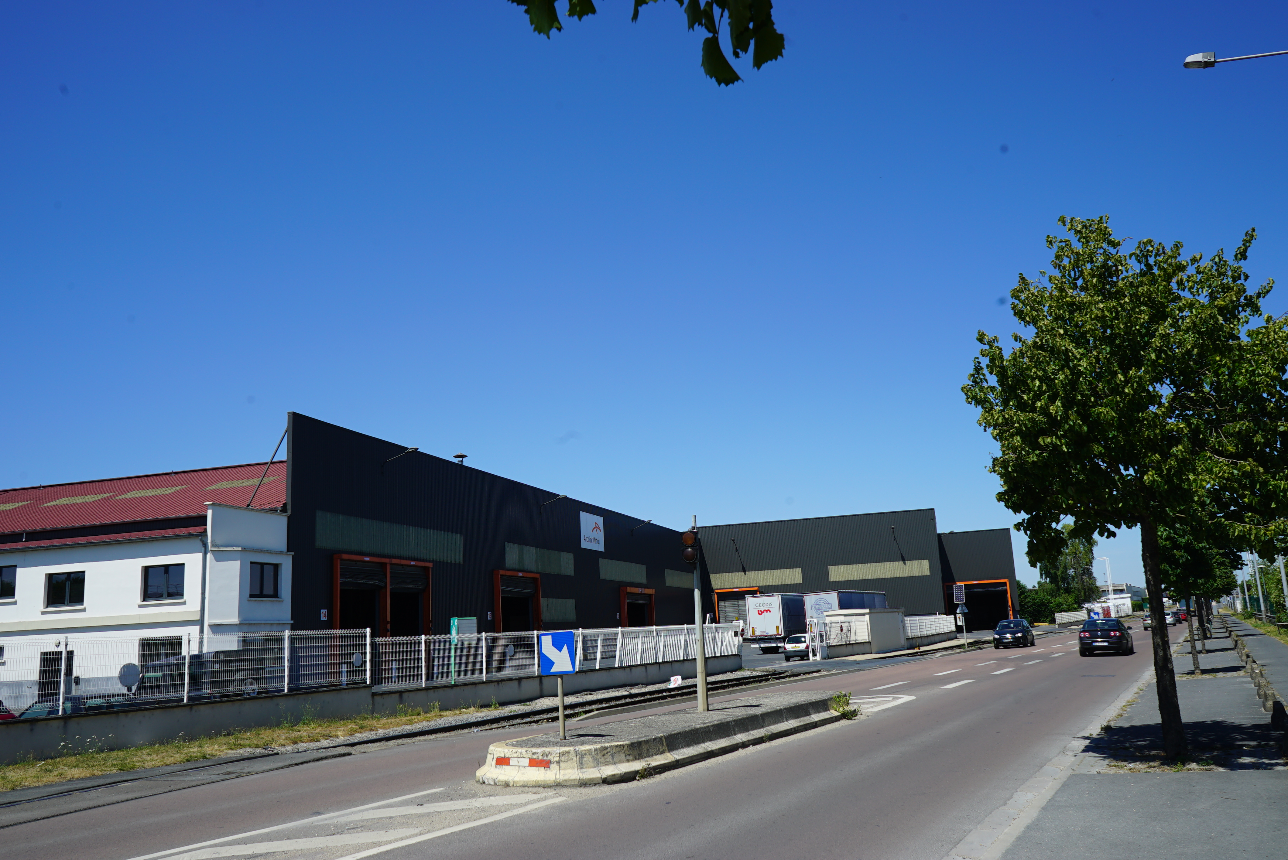 vue de cf. titre.